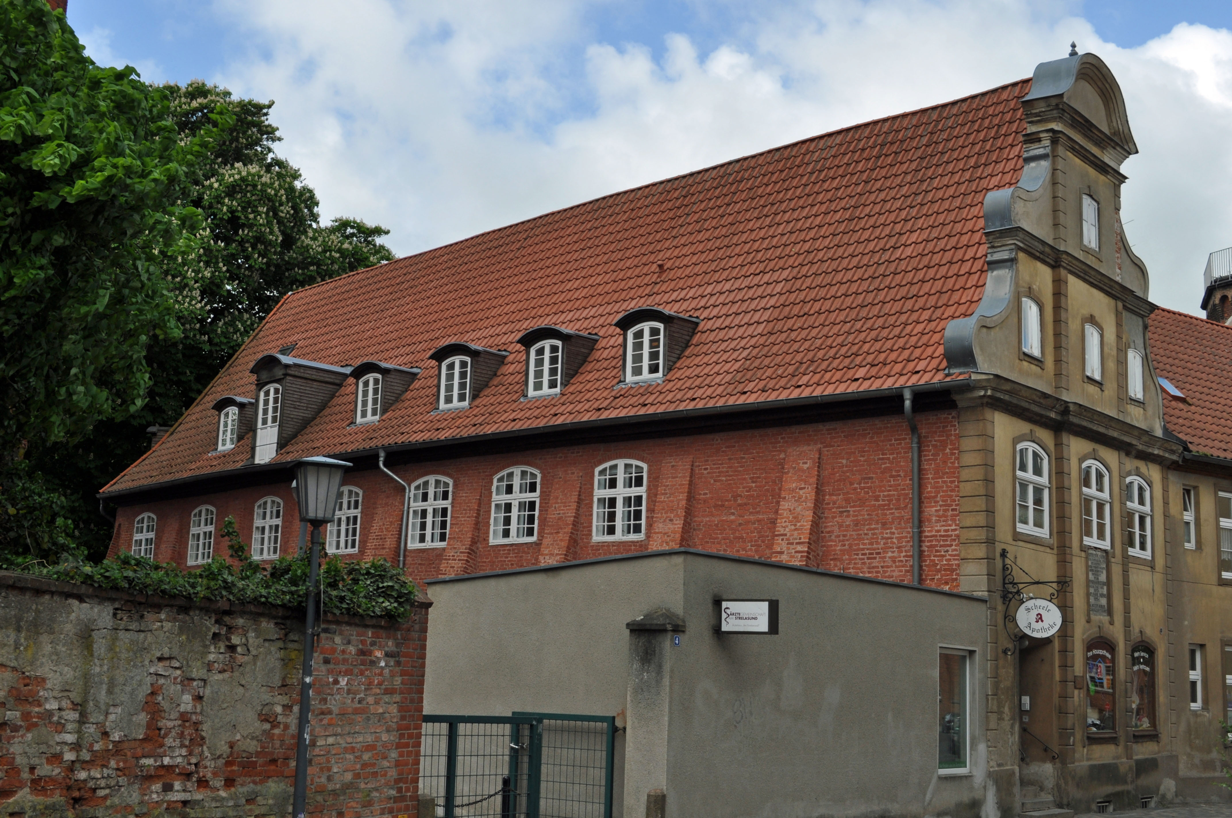 Gebäude in Stralsund, siehe Dateiname